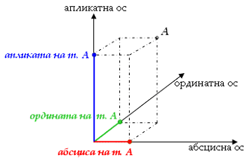 Illustration of coordinates: abscissa, ordinata, applicata (in Bulgarian). Илюстрация на координатите: абсциса, ордината, апликата (на български)